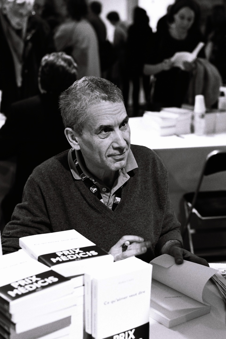 Mathieu Lindon au salon du livre Radio France, 26 novembre 2011